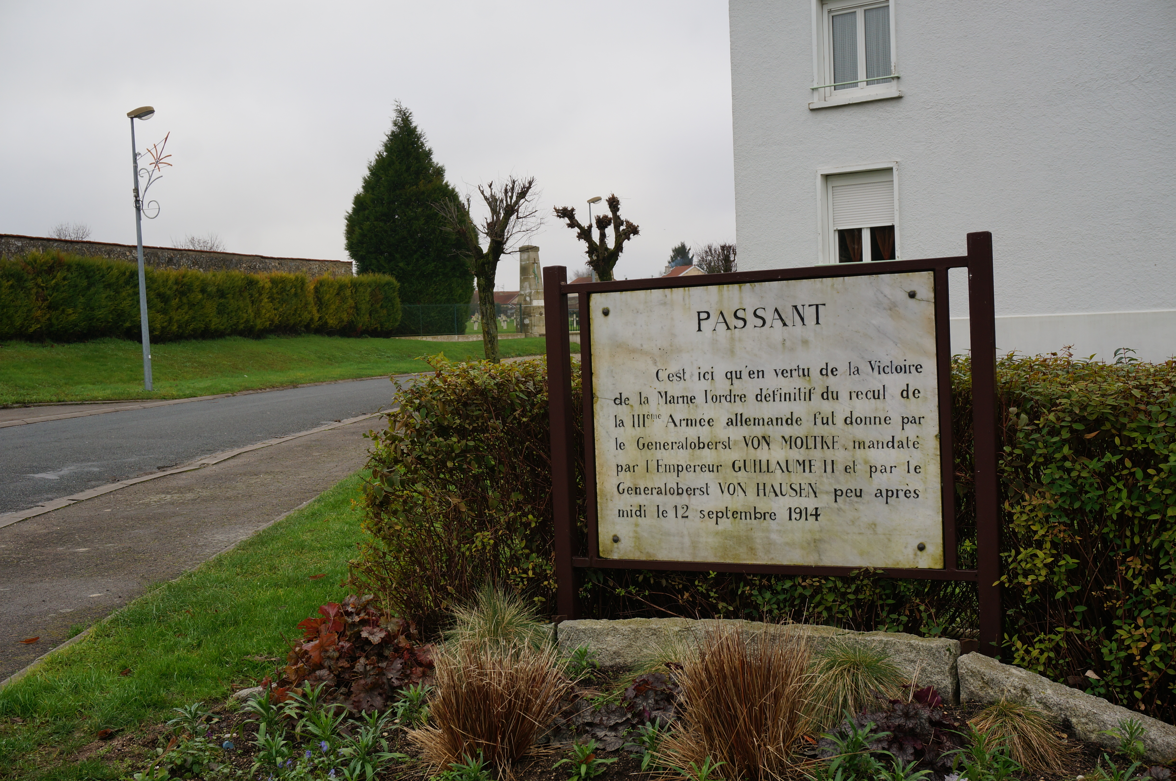 Denkmal zum Gedenken an den Rückzug der 3. Armee / Armeeoberkommando 3 (AOK 3, Deutsches Kaiserreich) am Eingang des Friedhofs Suippes, Marne.